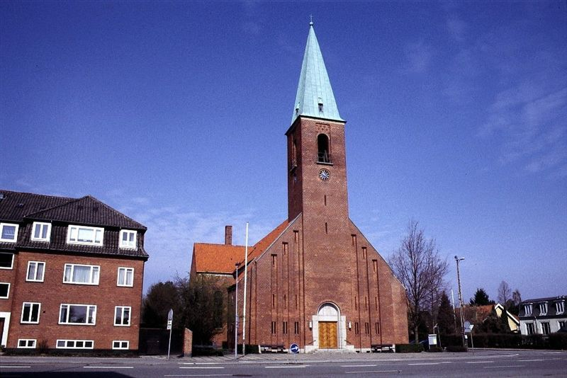 Helleruplund Kirke i Danmark. Helleruplund kirke